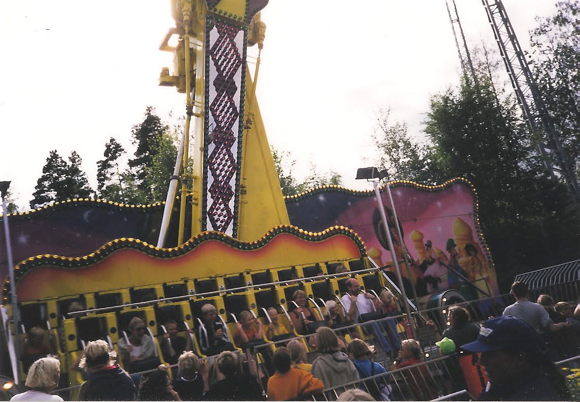 Bilde er fra attraksjonen Alladin som sto i parken fra 1996-2004.